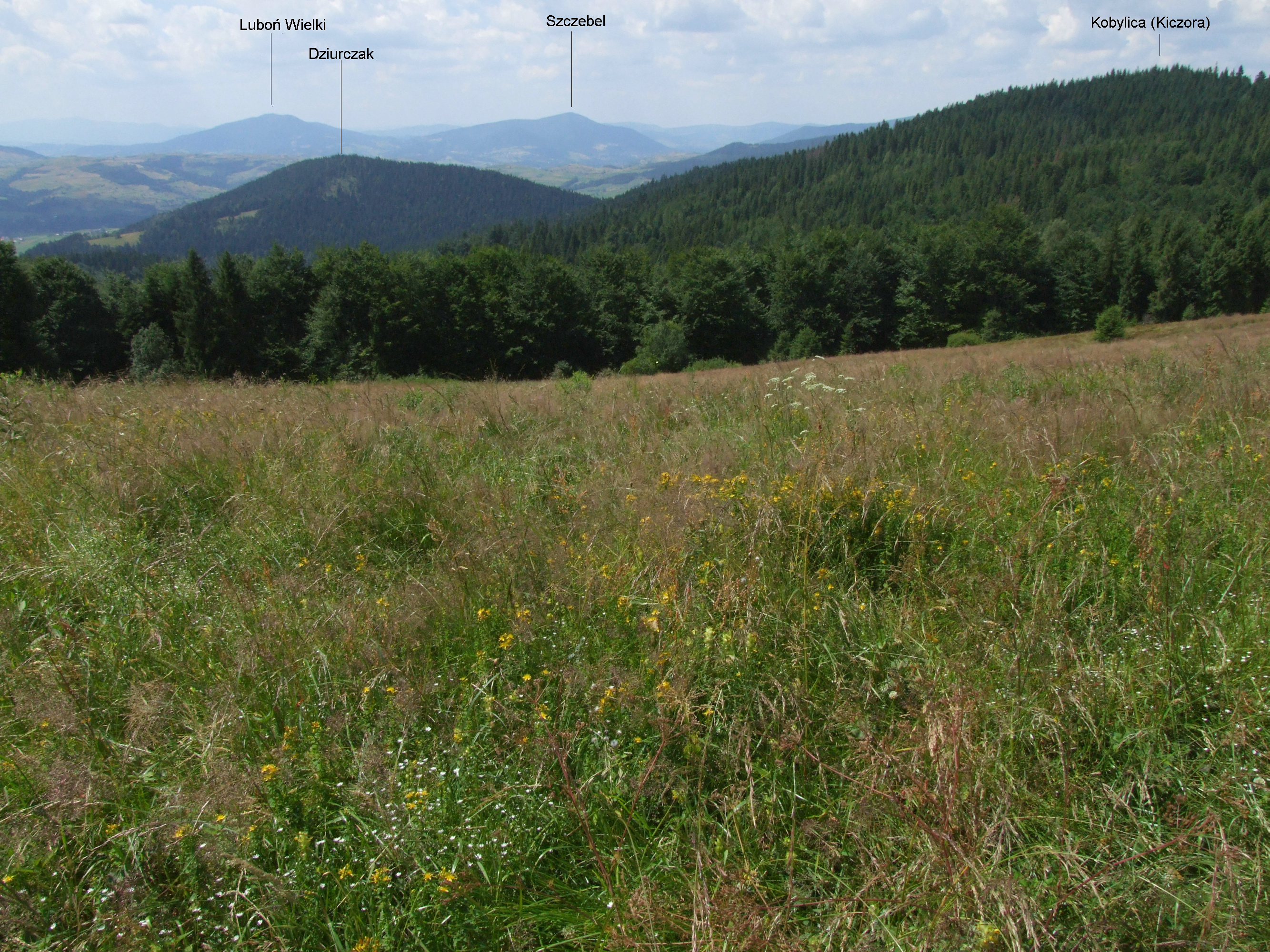 PWidok z Polany Folwarcznej w Beskidzie Wyspowym